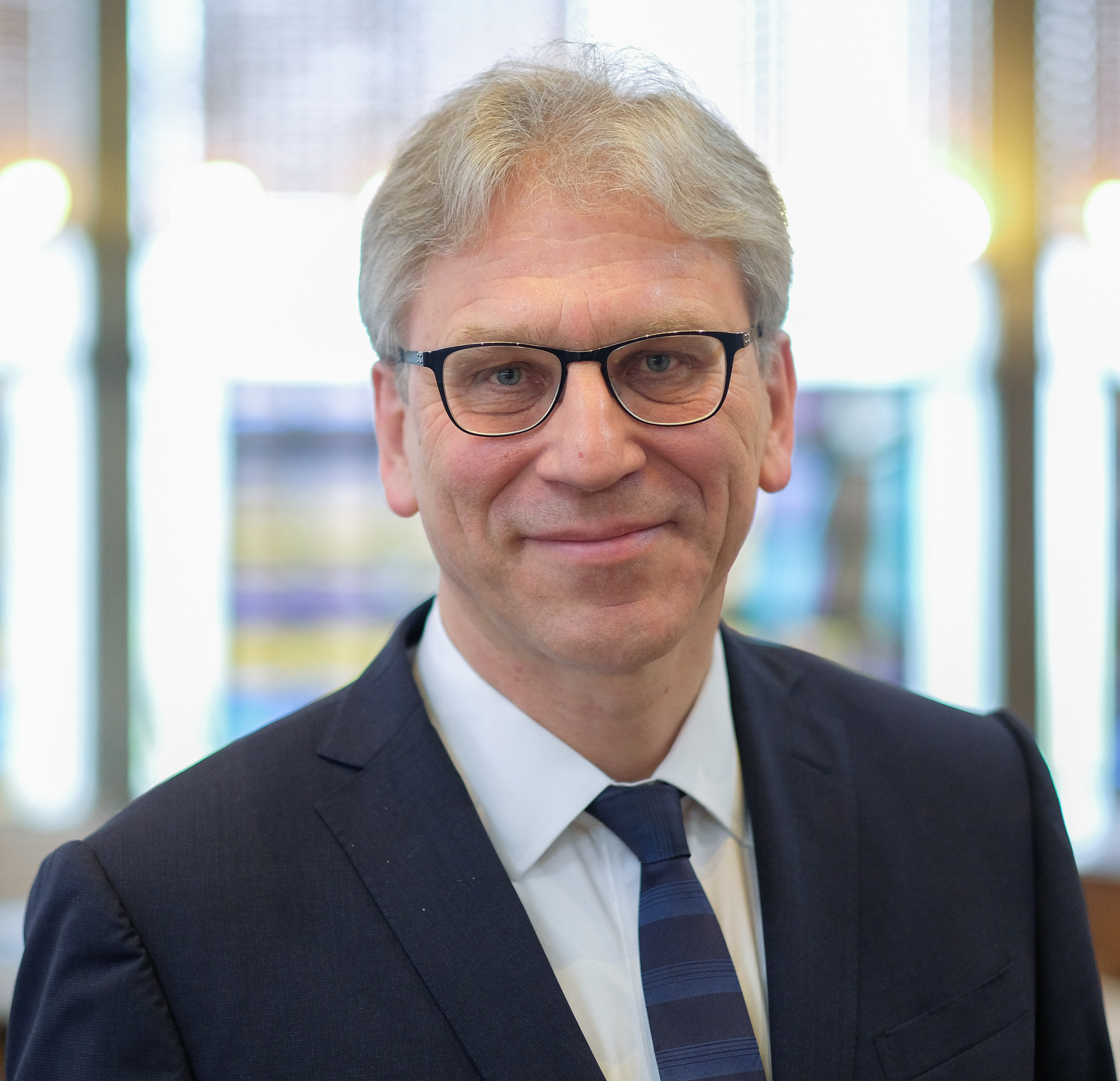 Kyrkjerådet har 30. januar tilsett generalsekretæren i Kyrkjenes verdsråd, prest og dr. theol. Olav Fykse Tveit (59) som ny preses i Bispemøtet. Under Kyrkjemøtet i Trondheim skal det søndag 26. april vere vigslingsgudsteneste i Nidarosdomen. Då blir Olav Fykse Tveit vigsla til sin nye leiarstilling i Den norske kyrkja.